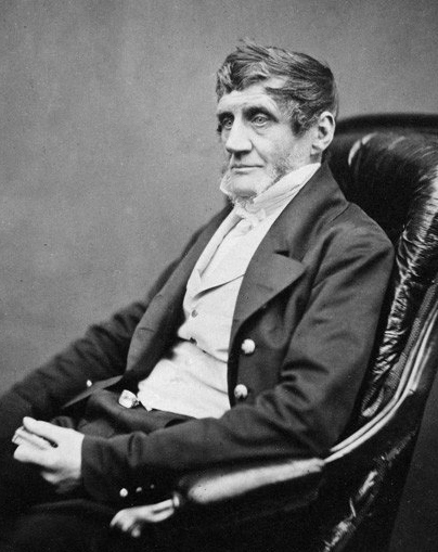 Francis Boott (26 September 1792– 25 December 1863)